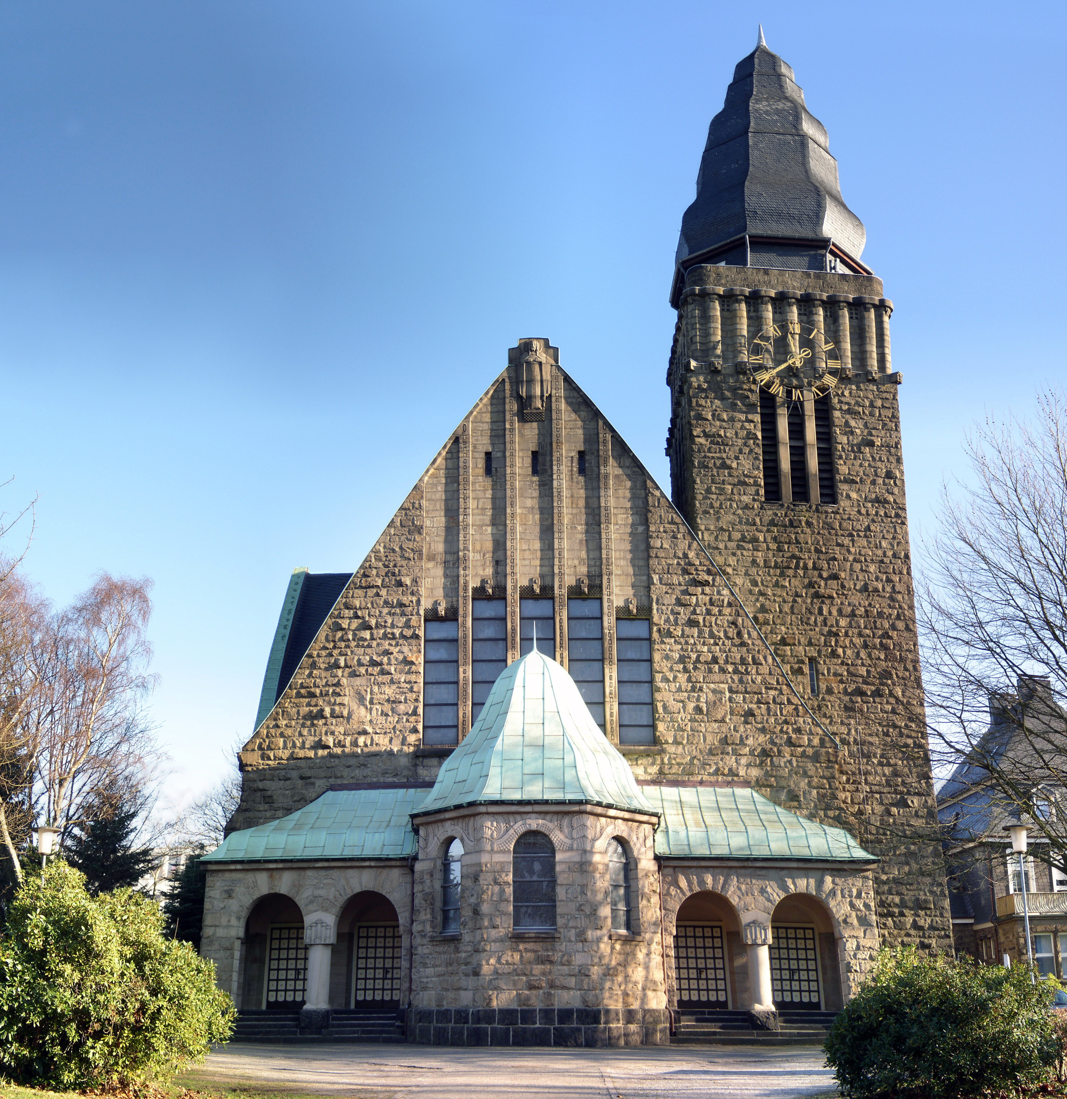 Christuskirche